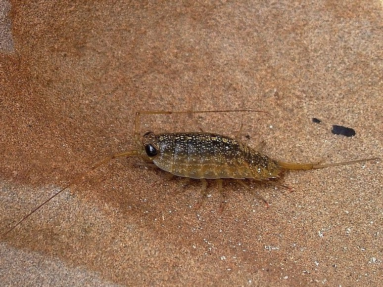 フナムシ Ligia exotica